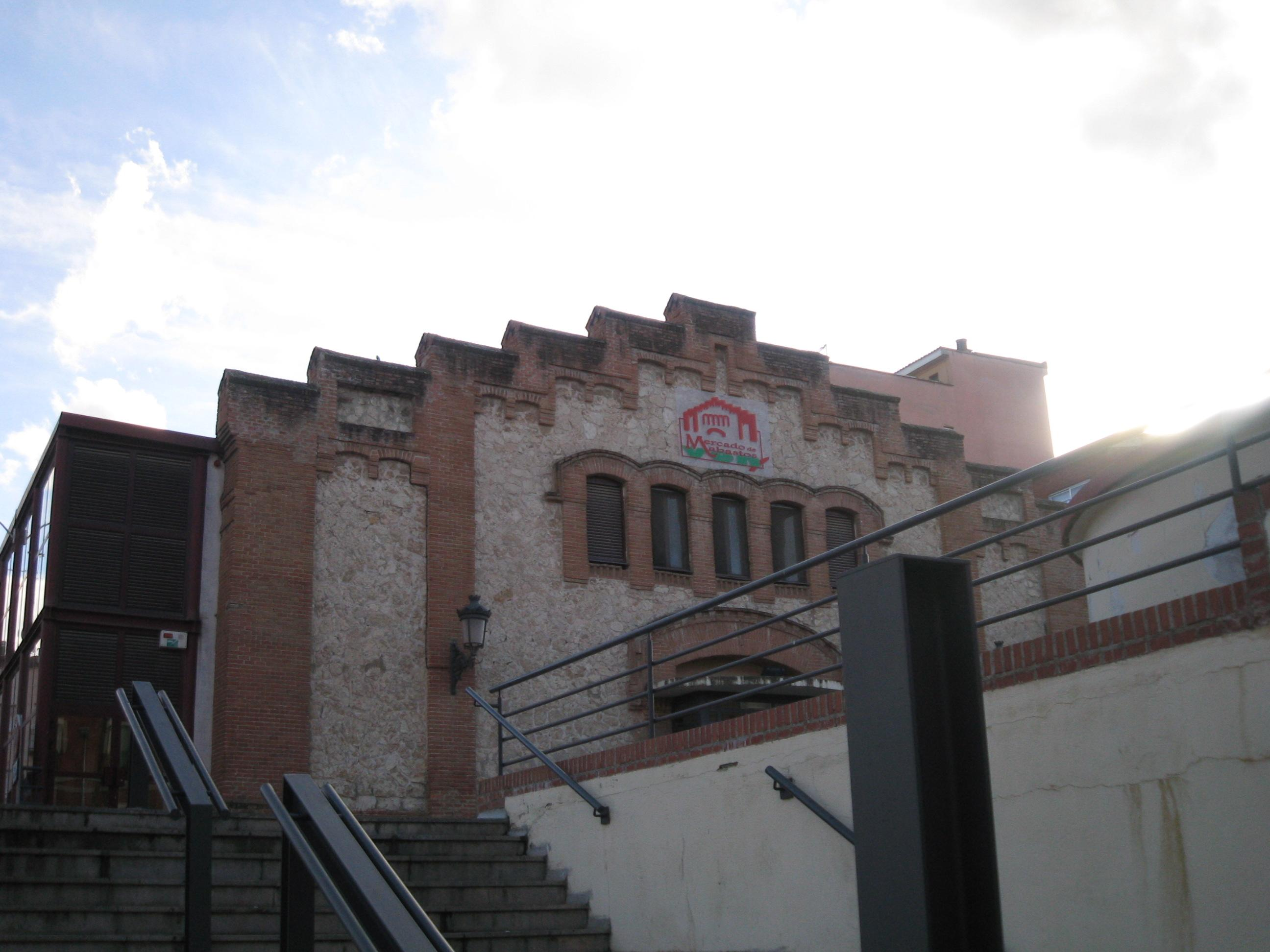 Market in Guadalajara, Spain